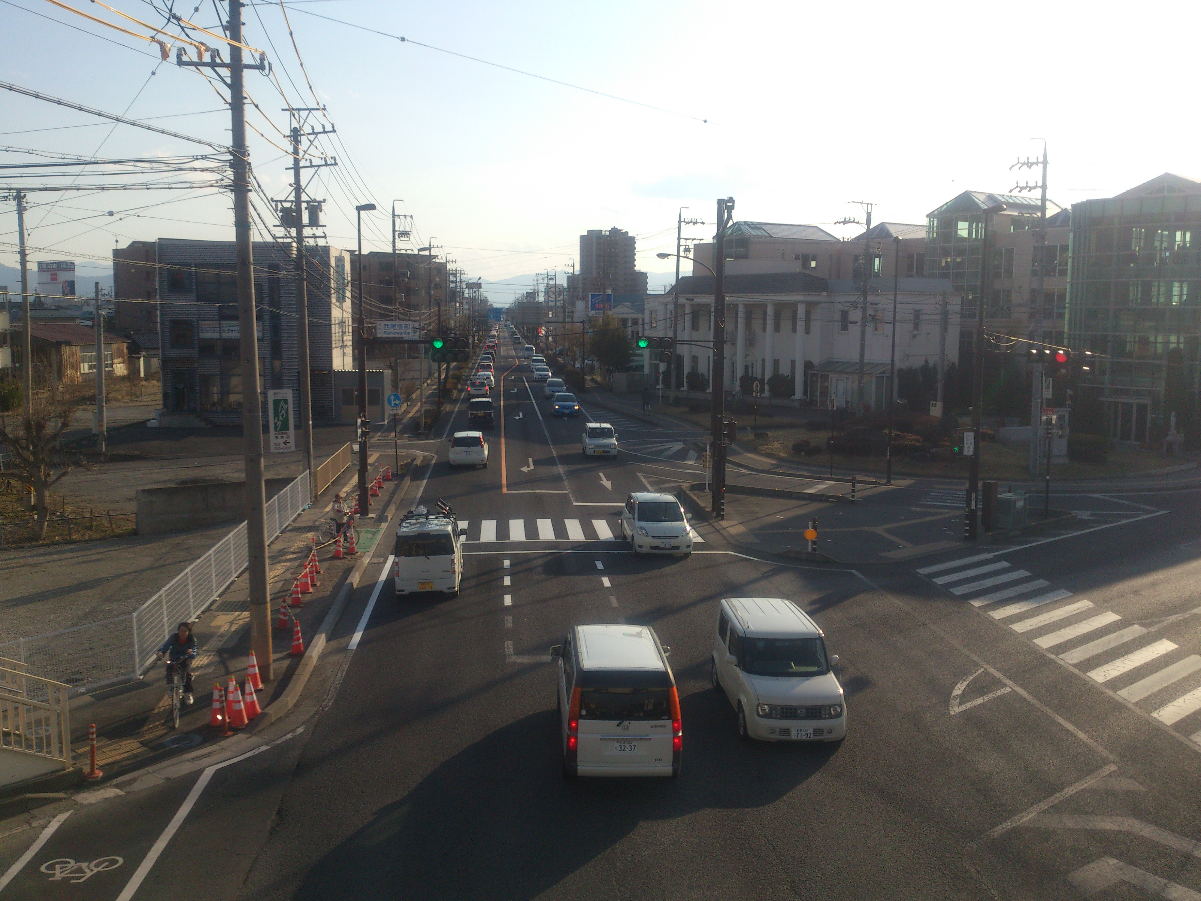 国道18号長野バイパス（長野市西尾張部から上田方面を望む）